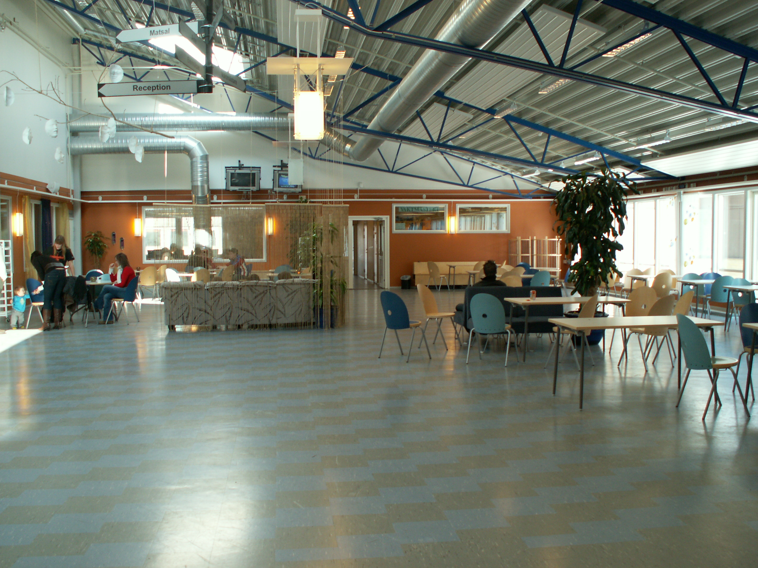 Birger Sjöberggymnasiets cafeteria. Bild av Notwist